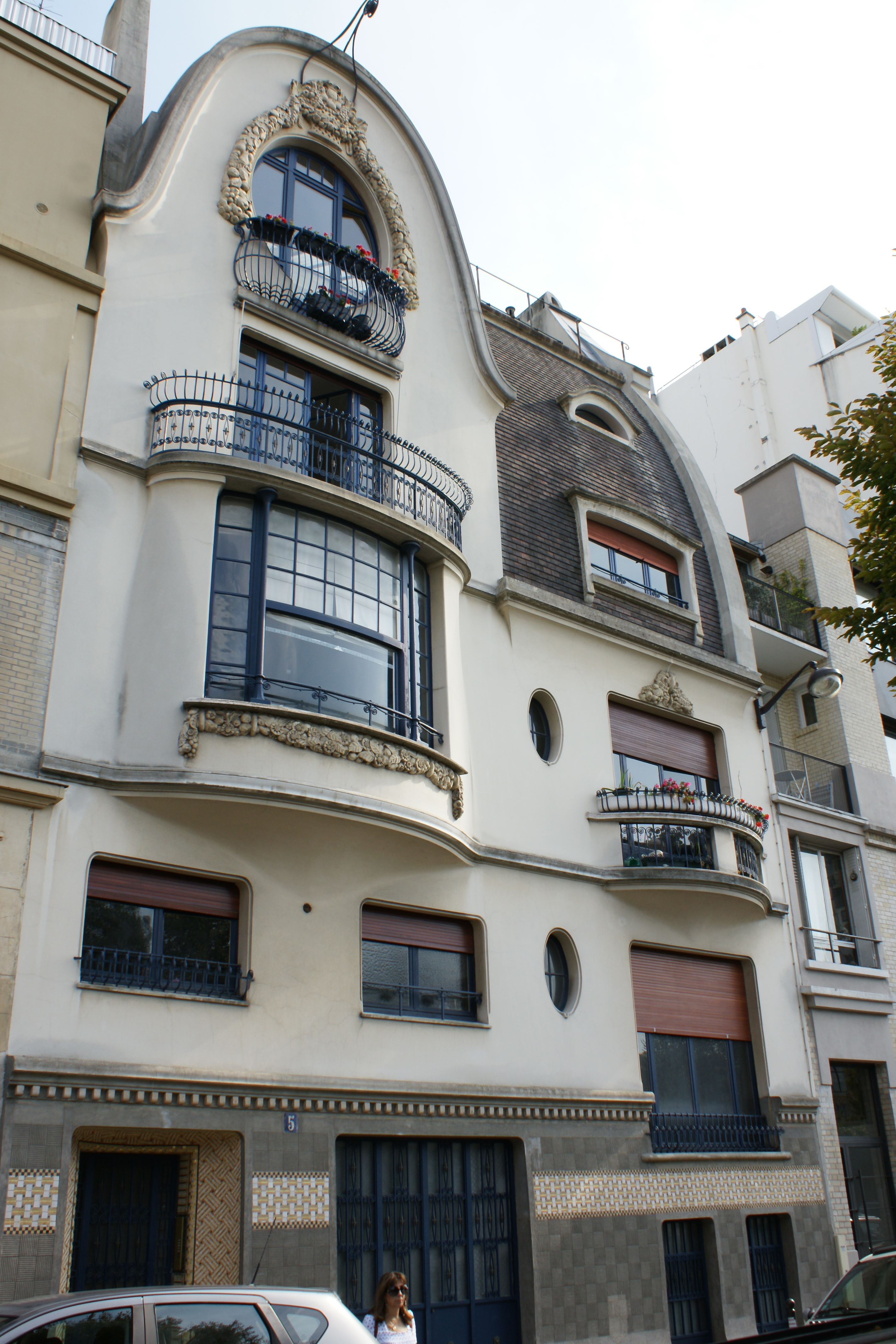 Hotel particulier de Paul Follot